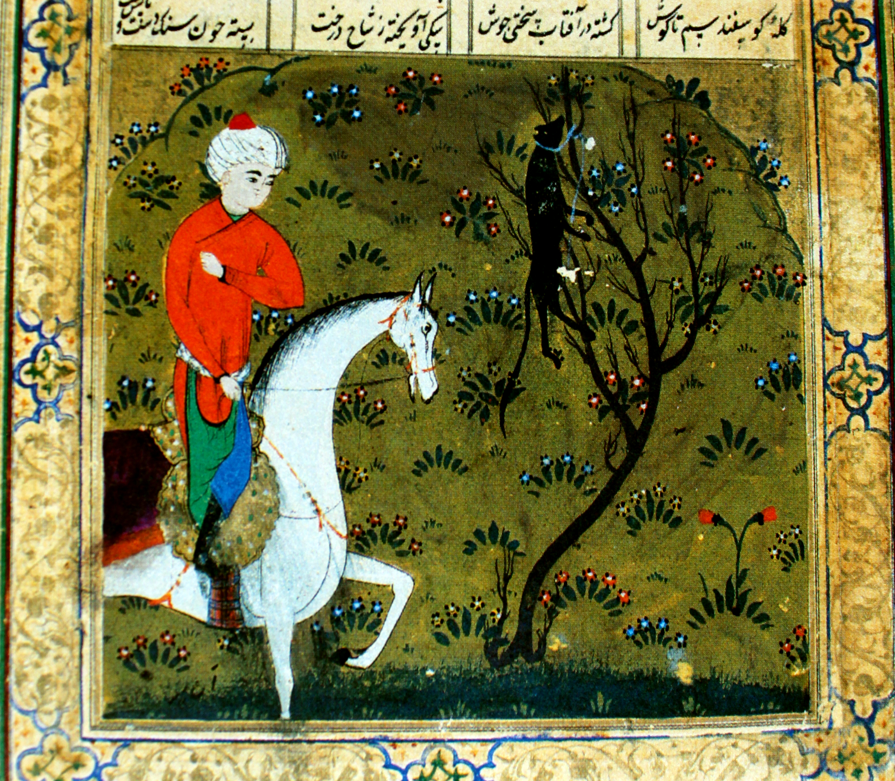 Bəhram Gur və çoban, 1636, Buxara, Bakı